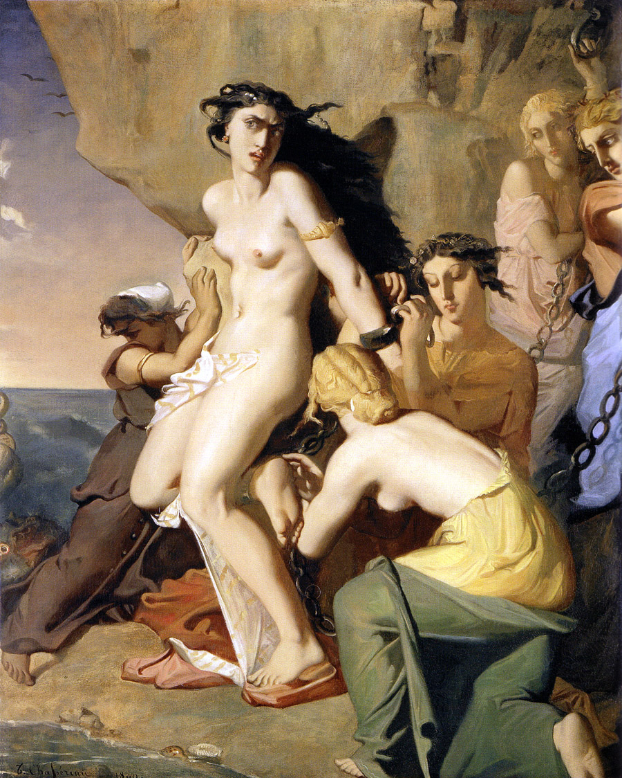 Pour expier l'insolence de sa mère qui s'était prétendue plus belle que les Néréides, Andromède est offerte en sacrifice à un monstre marin, qui approche à gauche. À la cruelle impassibilité des filles de Nérée s'oppose la terreur de la victime, qui sera délivrée par le héros Persée. Le tableau fut exposé au salon de 1841.